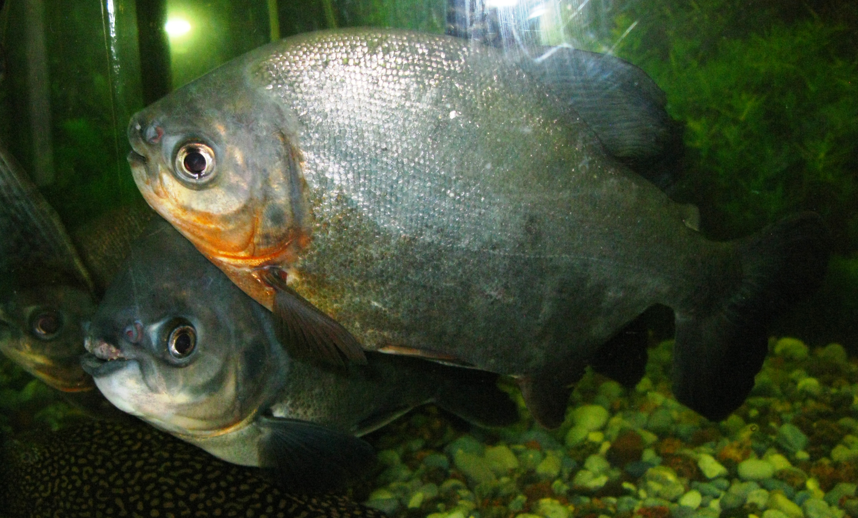 Красный паку (Colossoma bidens (Syn. Piaractus brachypomus)) в зоопарке города Гродно, Беларусь.